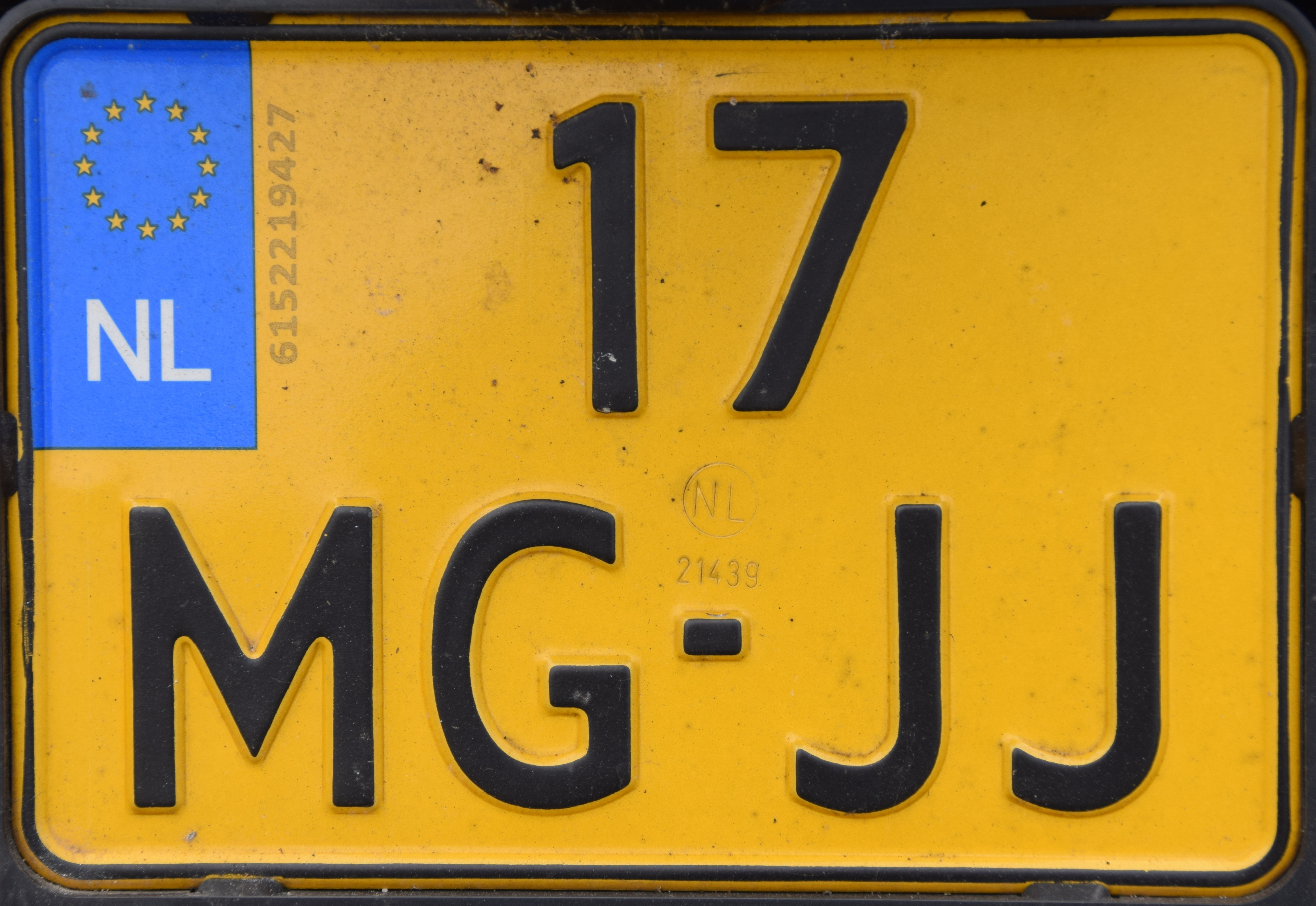 17-MG-JJ